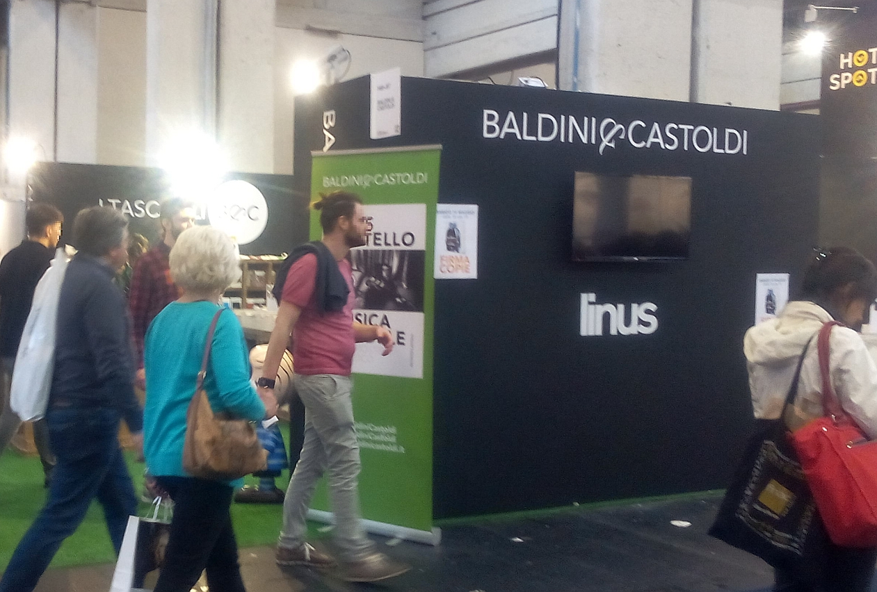 Stand edizioni Baldini & Castoldi - salone del libro 2016